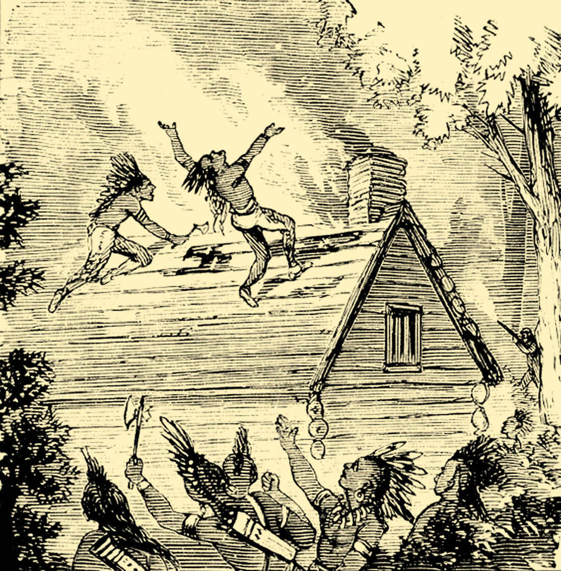 Raid on Deerfield, Massachusetts